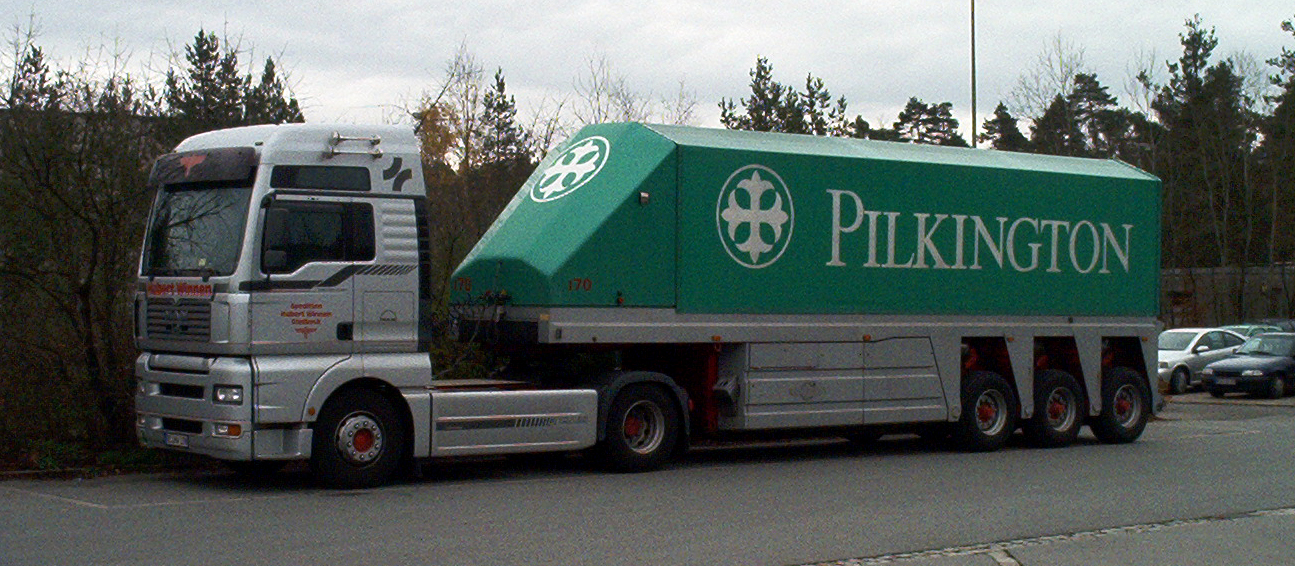 LKW des Glasherstellers Pilkington